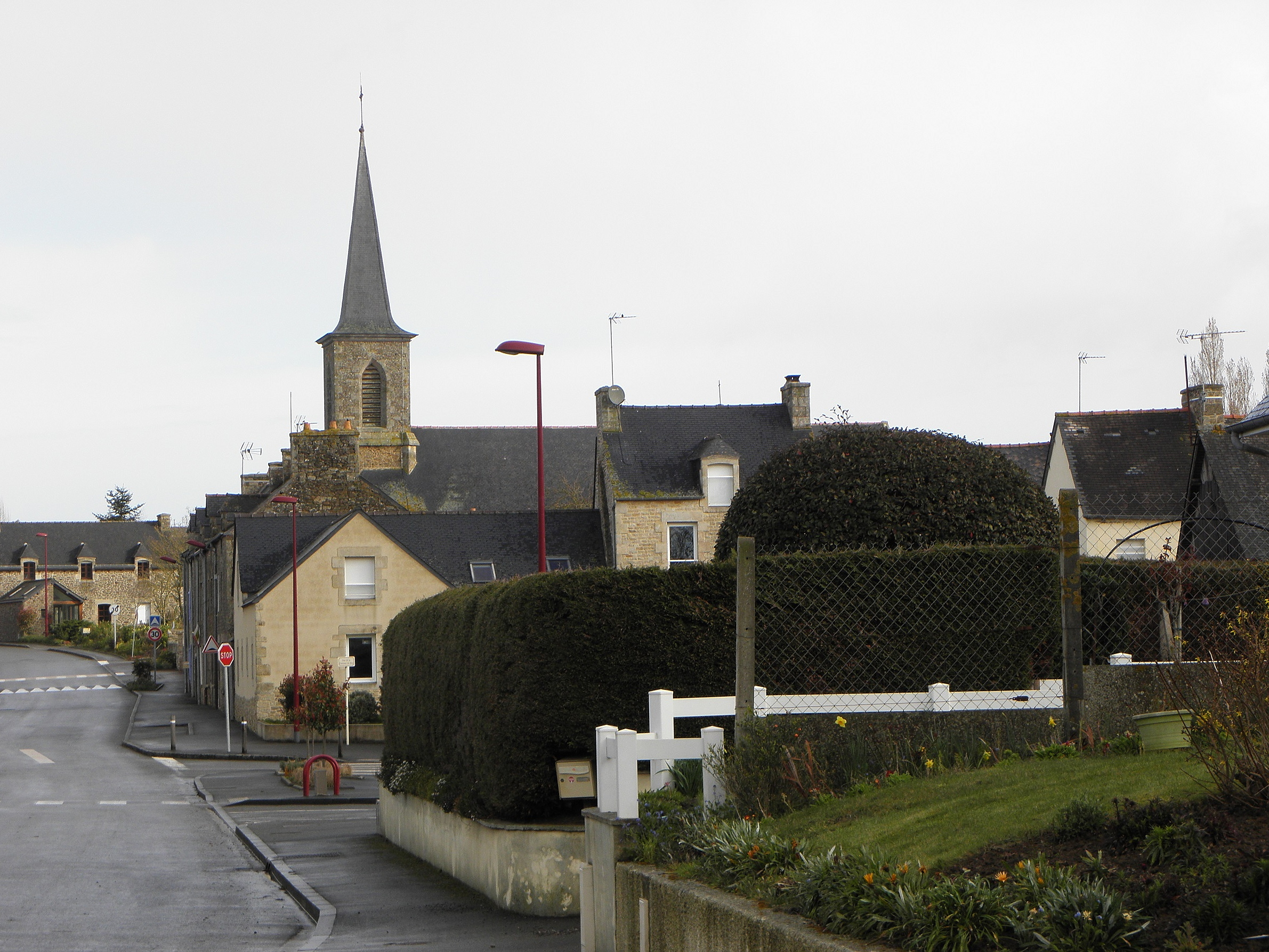 Bourg de Saint-Michel-de-Plélan (22).